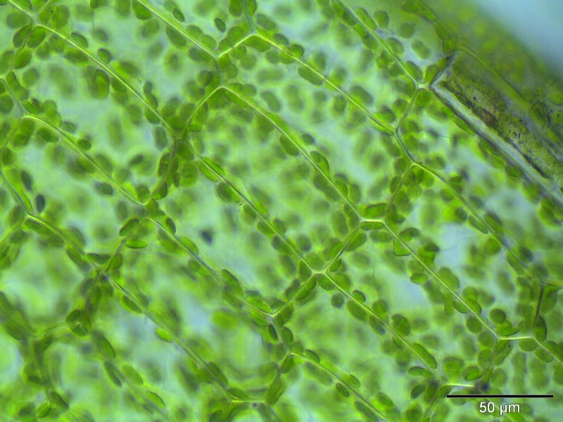 Punktiertes Wurzelsternmoos (Rhizomnium punctatum), Laminazellen, 400x vergrößert